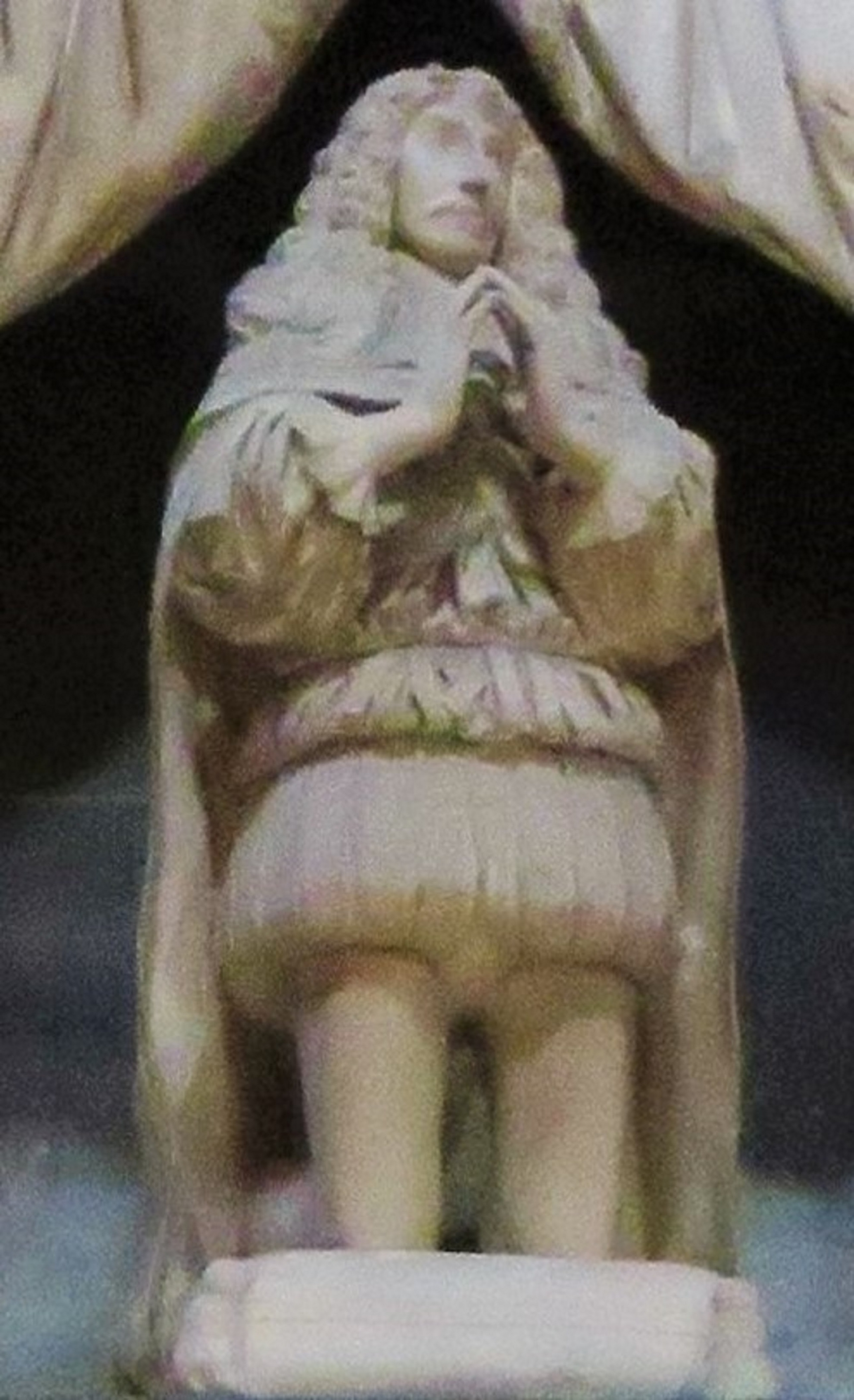 Particolare del monumento